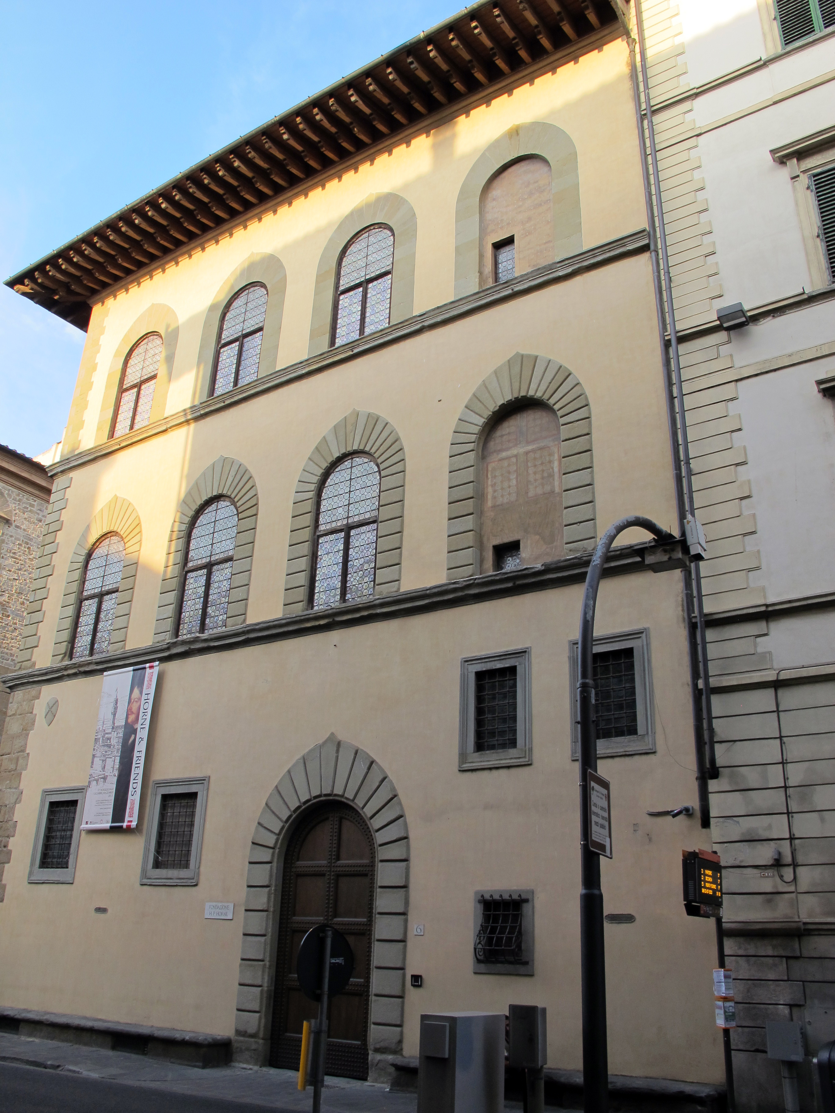 Palazzo corsi horne, ext.